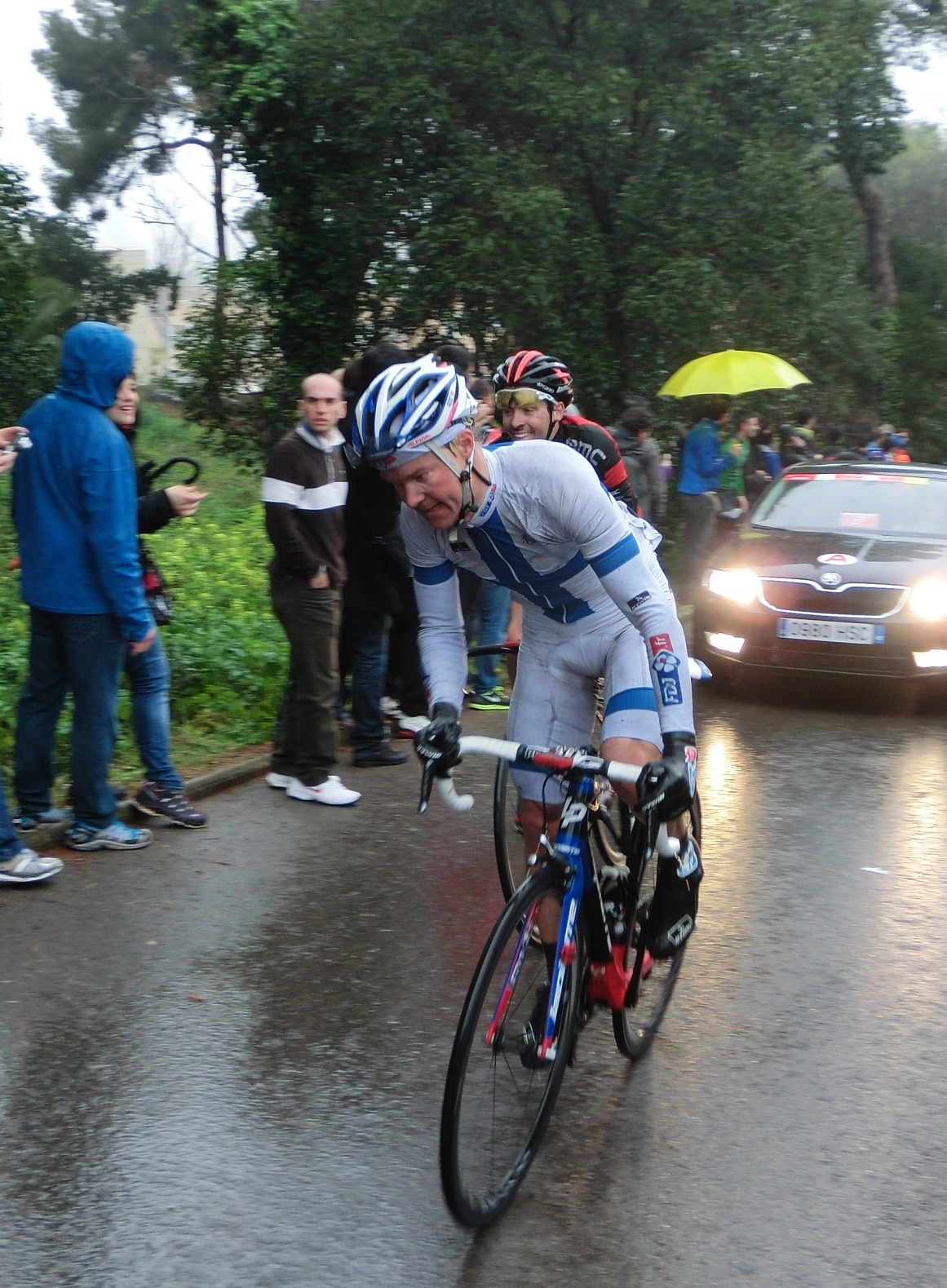 El corredor a Montjuïc (Barcelona, Països Catalans) a la 8a etapa de la Volta Ciclista a Catalunya 2014.